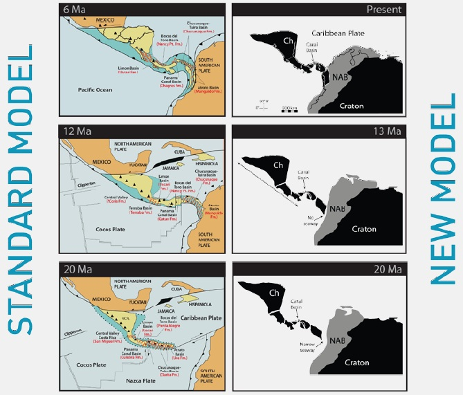 El cierre del Istmo de Panamá dividió un océano y unió a dos continentes. El científico emérito del Smithsonian Anthony Coates ysus colegas quienes participan en el Proyecto de Paleontologíade Panamá han sostenido durante mucho tiempo que el cierreocurrió hace unos 3.5 millones de años. Más recientemente,Camilo Montes de la Universidad de los Andes con CarlosJaramillo del Smithsonian como co-autor, sugirieron que inicialmenteapareció un puente de tierra intermitente hace 15millones de años. Coates y Montes presentan sus argumentosen las columnas de los autores invitados de este mes.